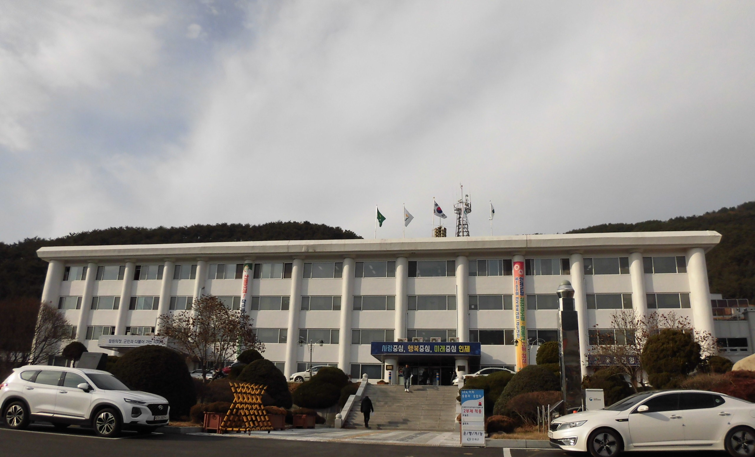 강원도 인제군에 인제군청